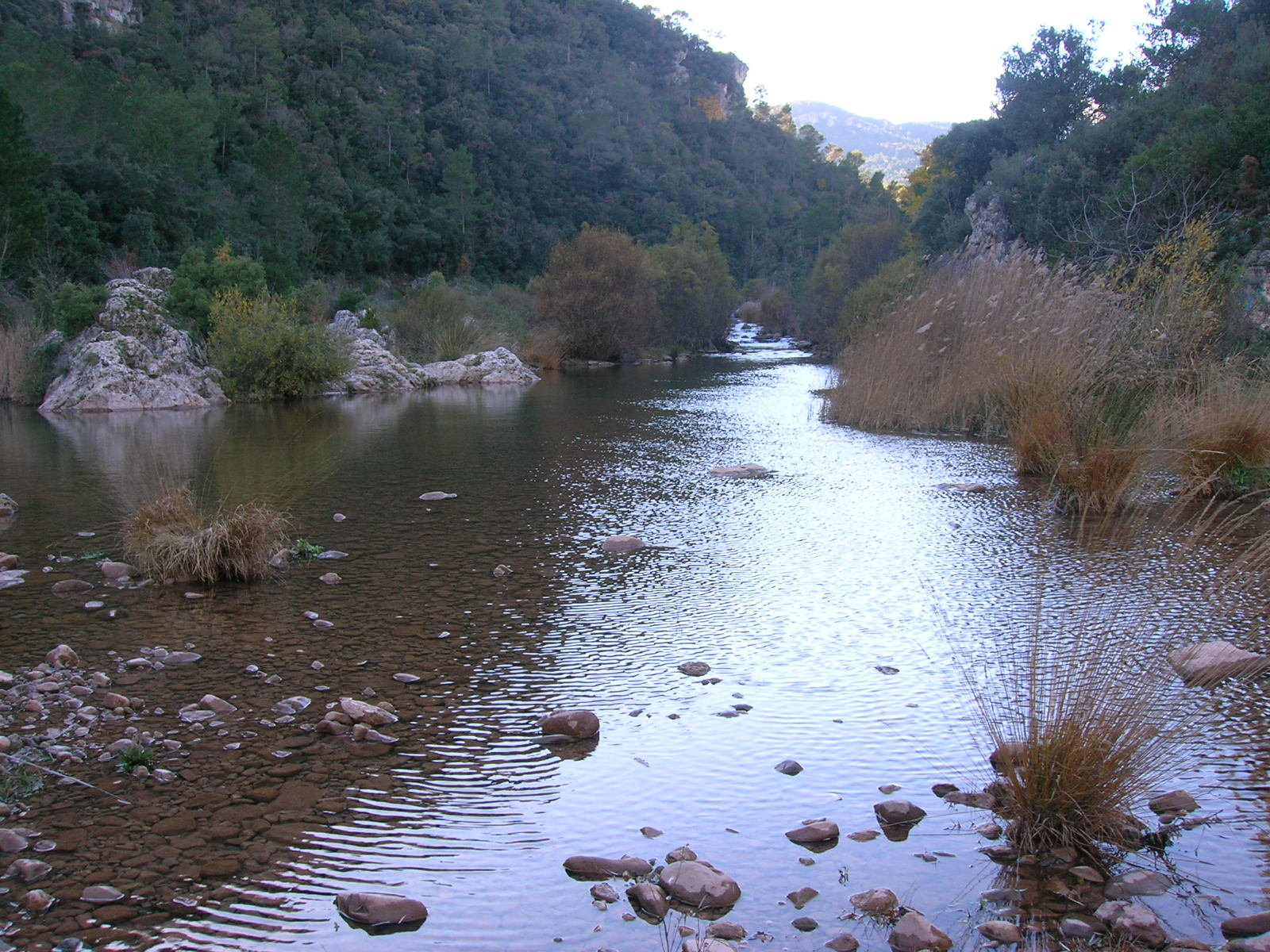 Self made El Brugent entre La Riba i Farena